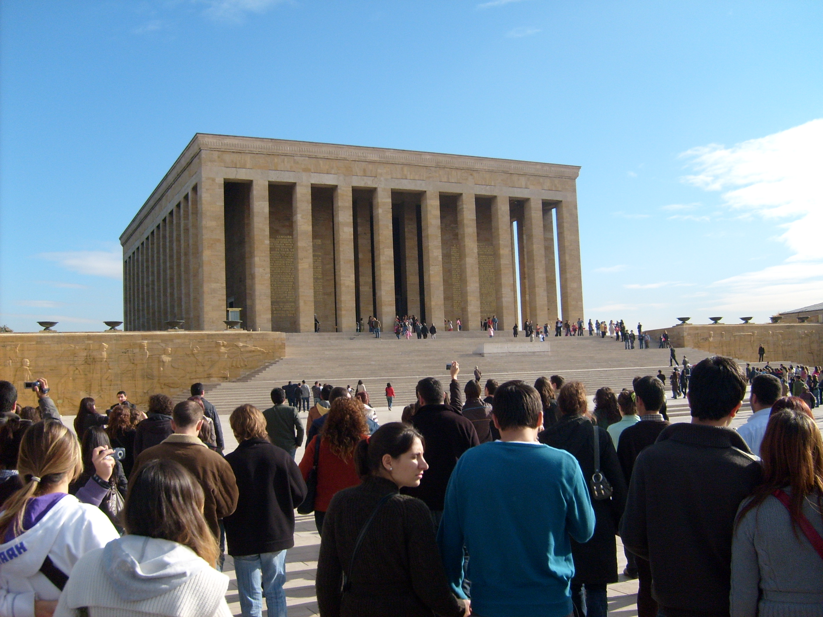 Ankara 3 Kasım 2007